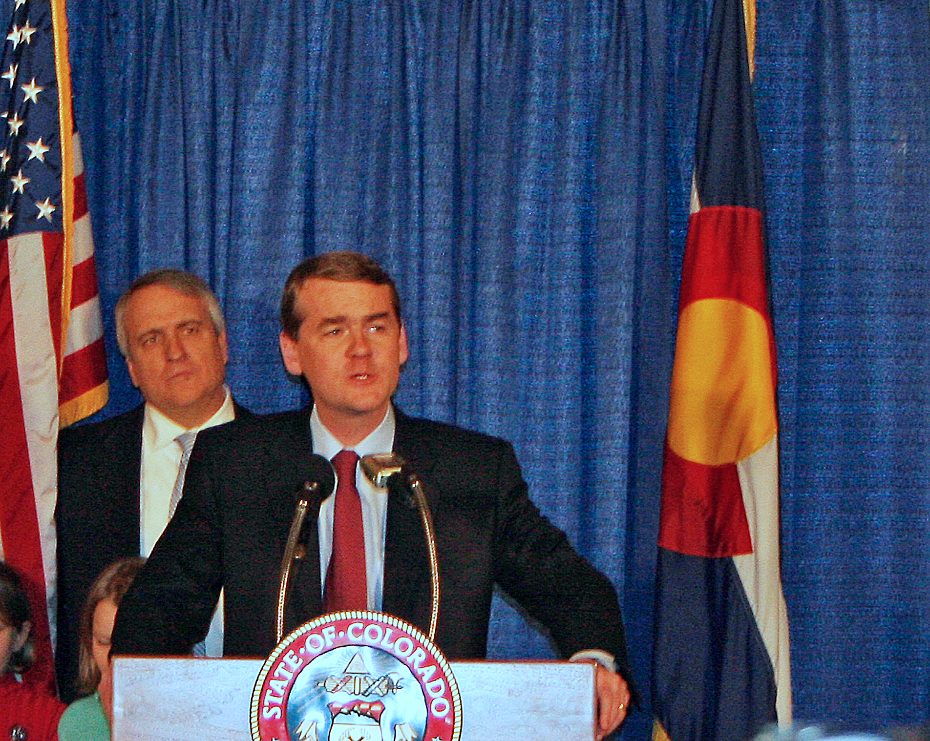 Michael Bennet, Colorado Politician